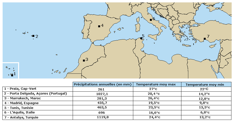 Tableau comparatif de 7 points du Hotspot Bassin méditerranéen - Macaronésie.